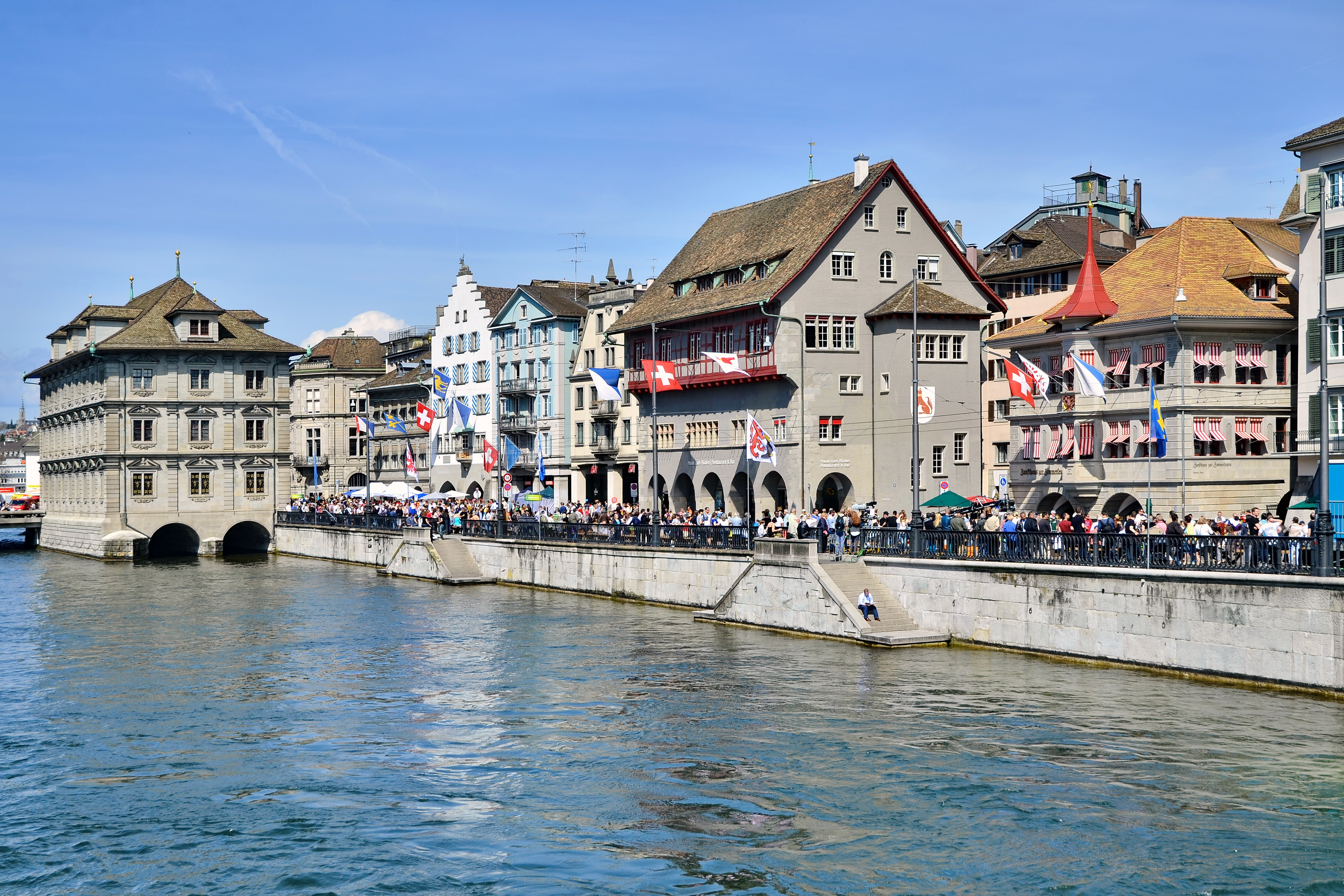 Gmüesbrugg, Rathaus, Zunfthaus zur Saffran, Zunfthaus zur Haue, Haus zum Rüden and Zunfthaus zur Zimmerleuten at Limmatquai in Zürich (Switzerland), as seen from Münsterbrücke towards Münsterhof.